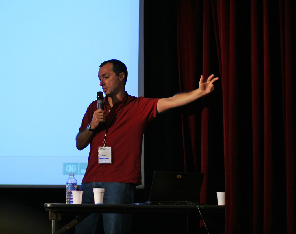 Daniel Glazman lors de la conférence Paris-Web 2006